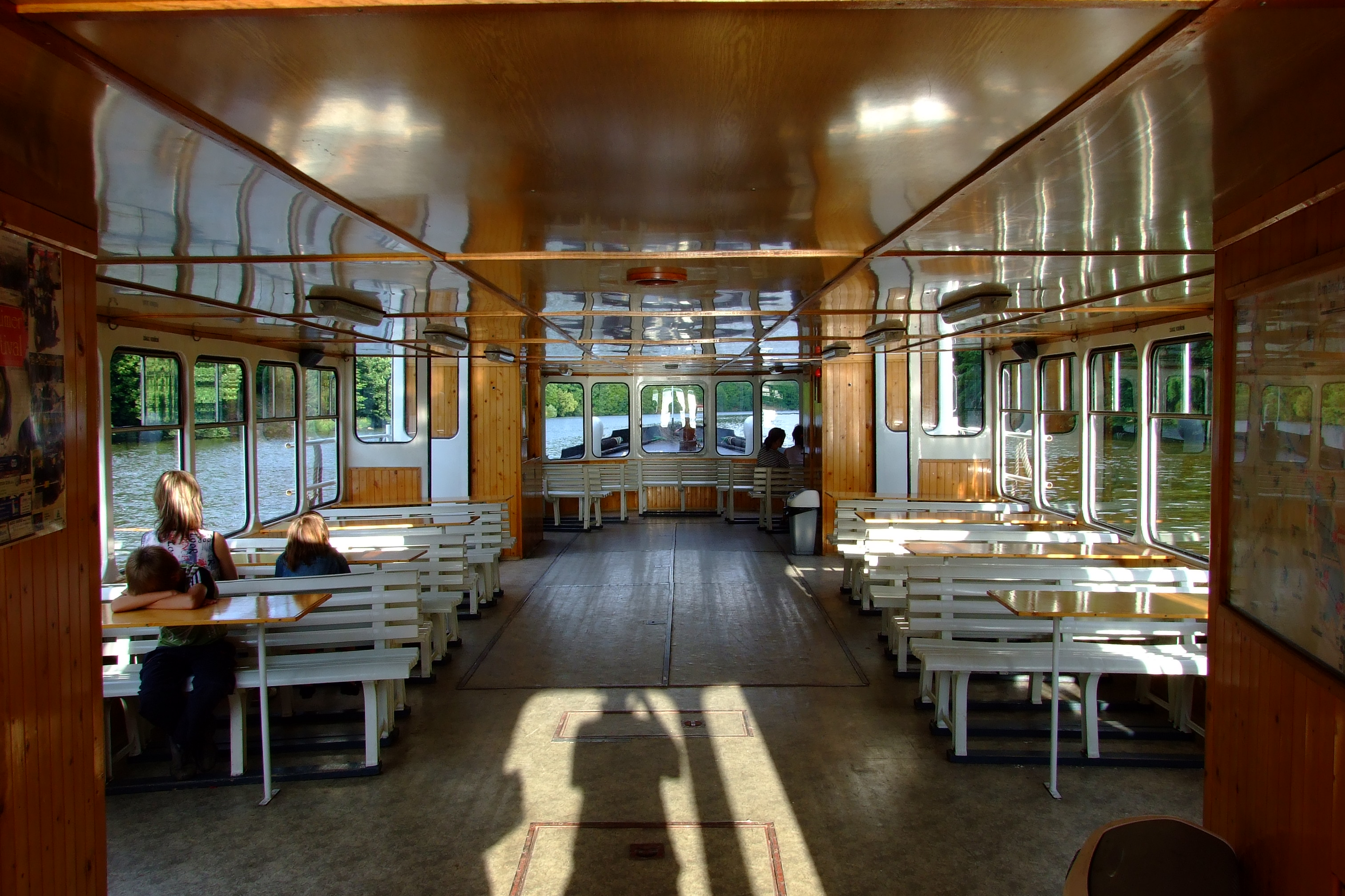 Česky: Interiér lodi Bratislava, plující na Brněnské přehradě